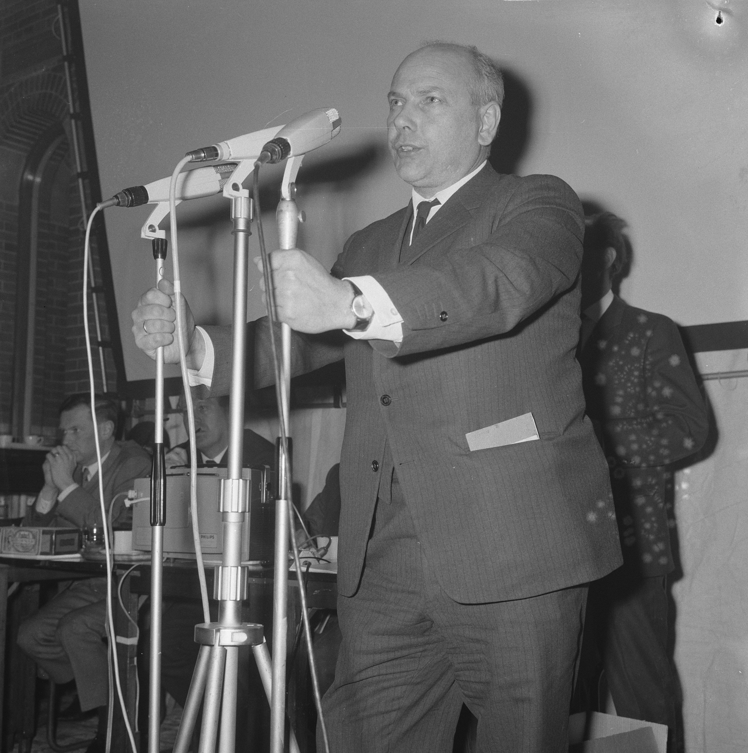 Collectie / Archief : Fotocollectie Anefo Reportage / Serie : [ onbekend ] Beschrijving : Minister Den Uyl (PvdA) tijdens toespraak in de Koopmansbeurs Datum : 23 maart 1966 Trefwoorden : toespraken Persoonsnaam : Uyl, Joop den Instellingsnaam : Koopmansbeurs Fotograaf : Nijs, Jac. de / Anefo Auteursrechthebbende : Nationaal Archief Materiaalsoort : Negatief (zwart/wit) Nummer archiefinventaris : bekijk toegang 2.24.01.03 Bestanddeelnummer : 918-9502